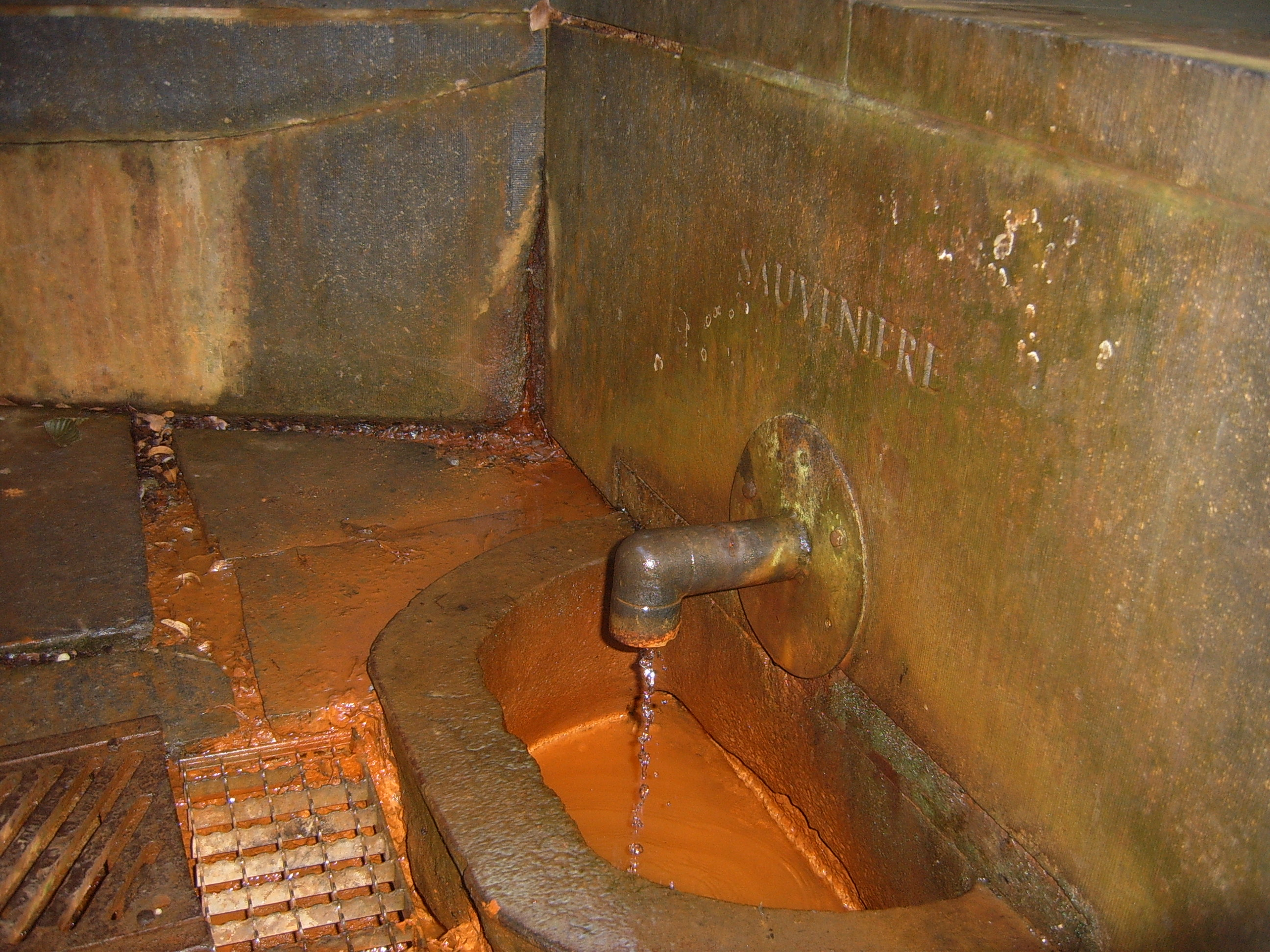 Source de la Sauvenière à Spa Personal picture, I set it in public domain